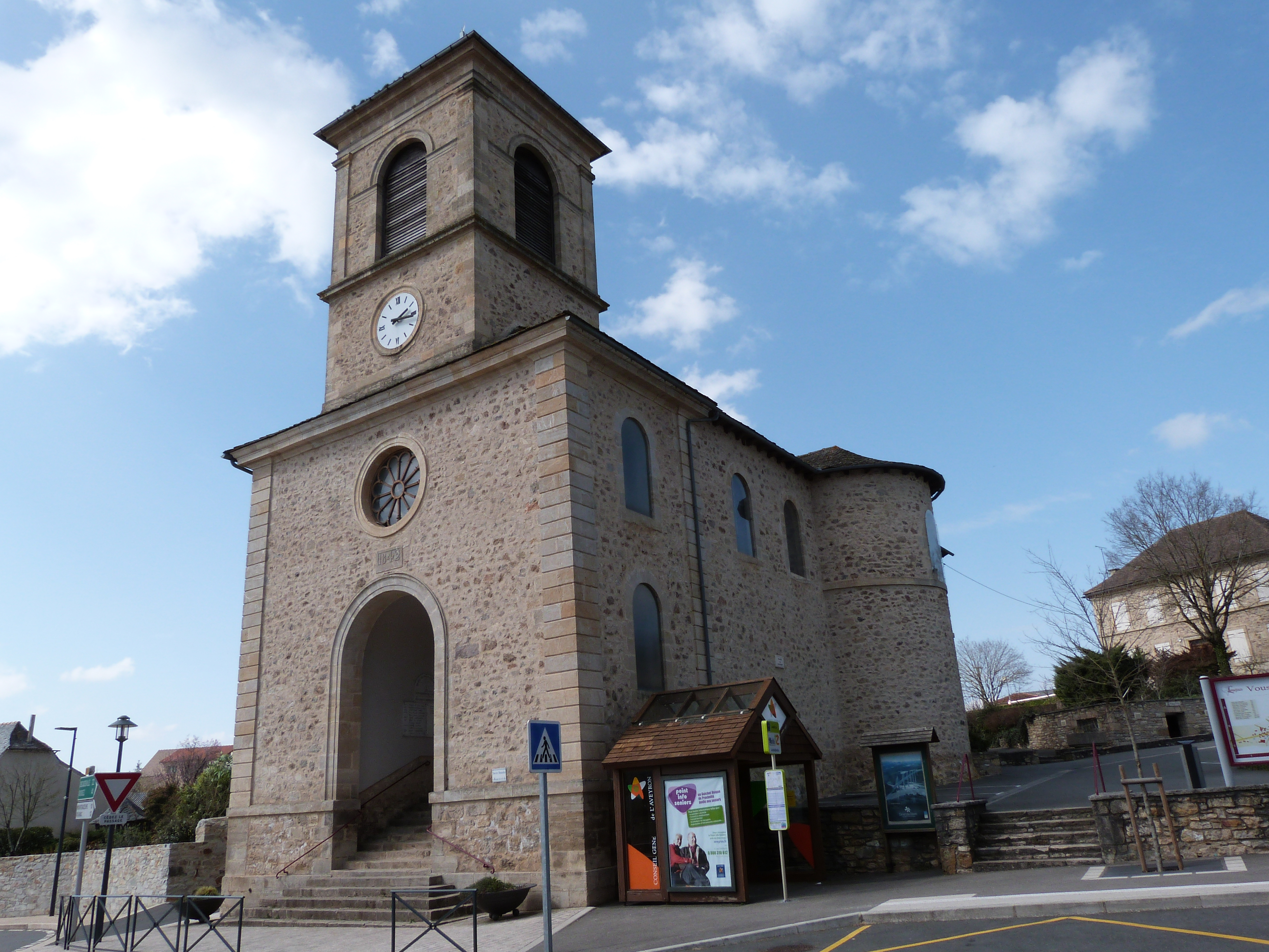 Eglise Saint-Baudile à Lanuéjouls